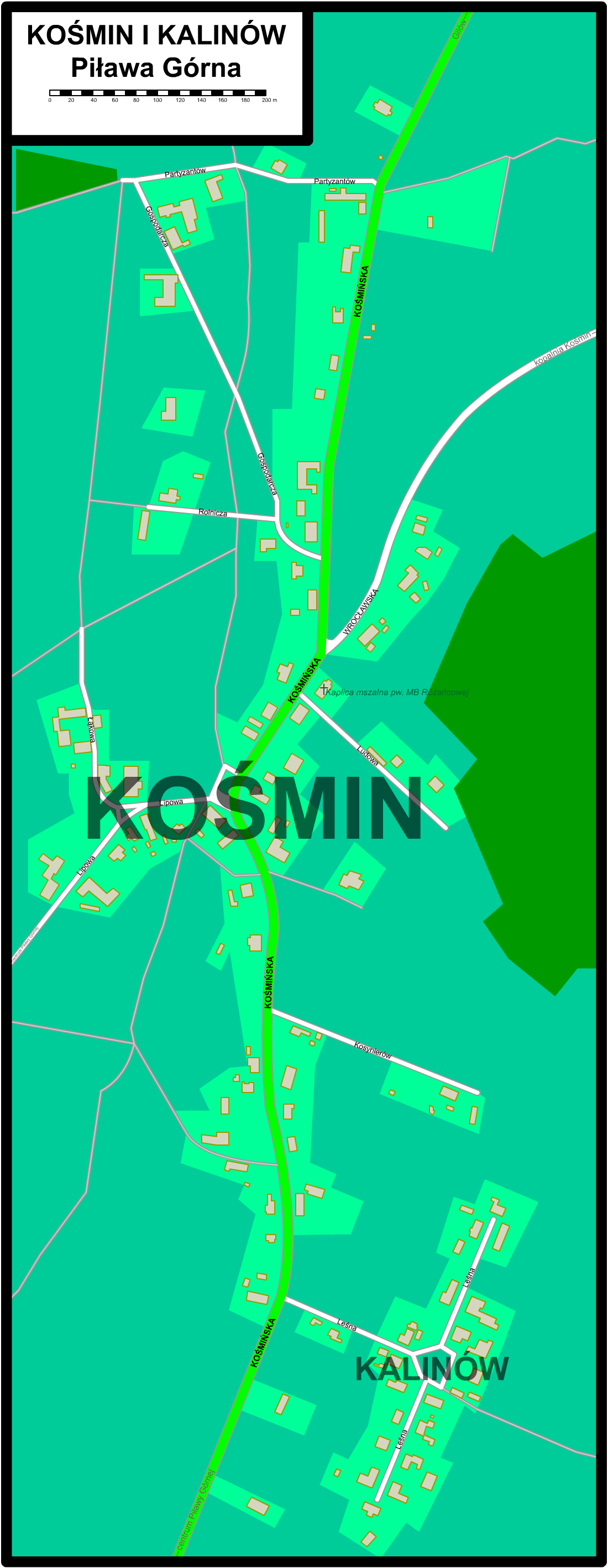 Dwie dzielnice miasta Piława Górna